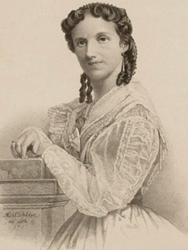 Suzanna Nannette (Suze) Sablairolles (b. Middelburg 13-1-1829 – d. Amsterdam 13-1-1867), Dutch actress